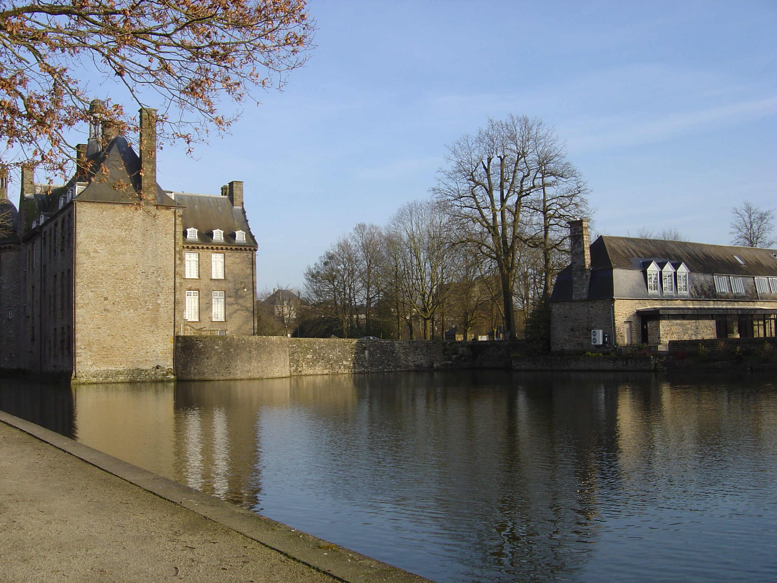 Photo du château de Flers de l'Orne prise le 04/02/07.